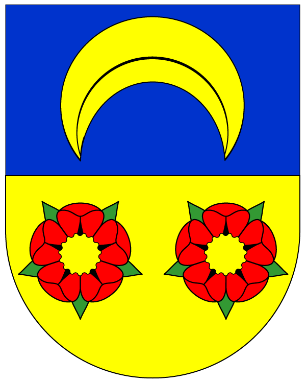 Das Wappen der Obervogtei Neuamt im Stadtstaat Zürich bis 1798